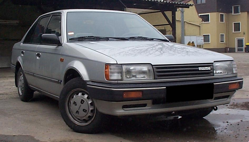 Mazda 323 BF Stufenheck vor dem 87er Facelift